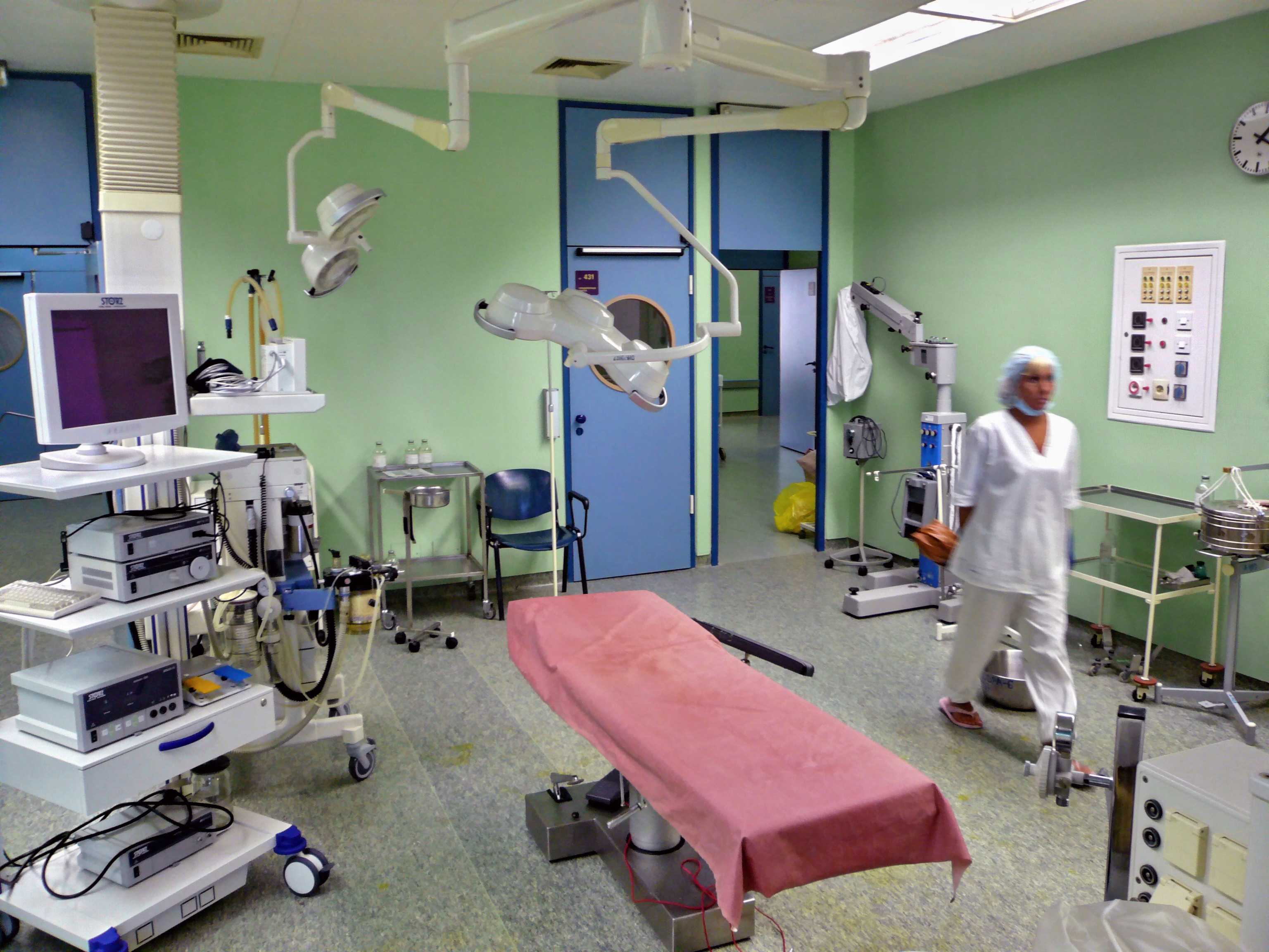 Операционный зал МБУЗ "Городская больница №1" Норильск